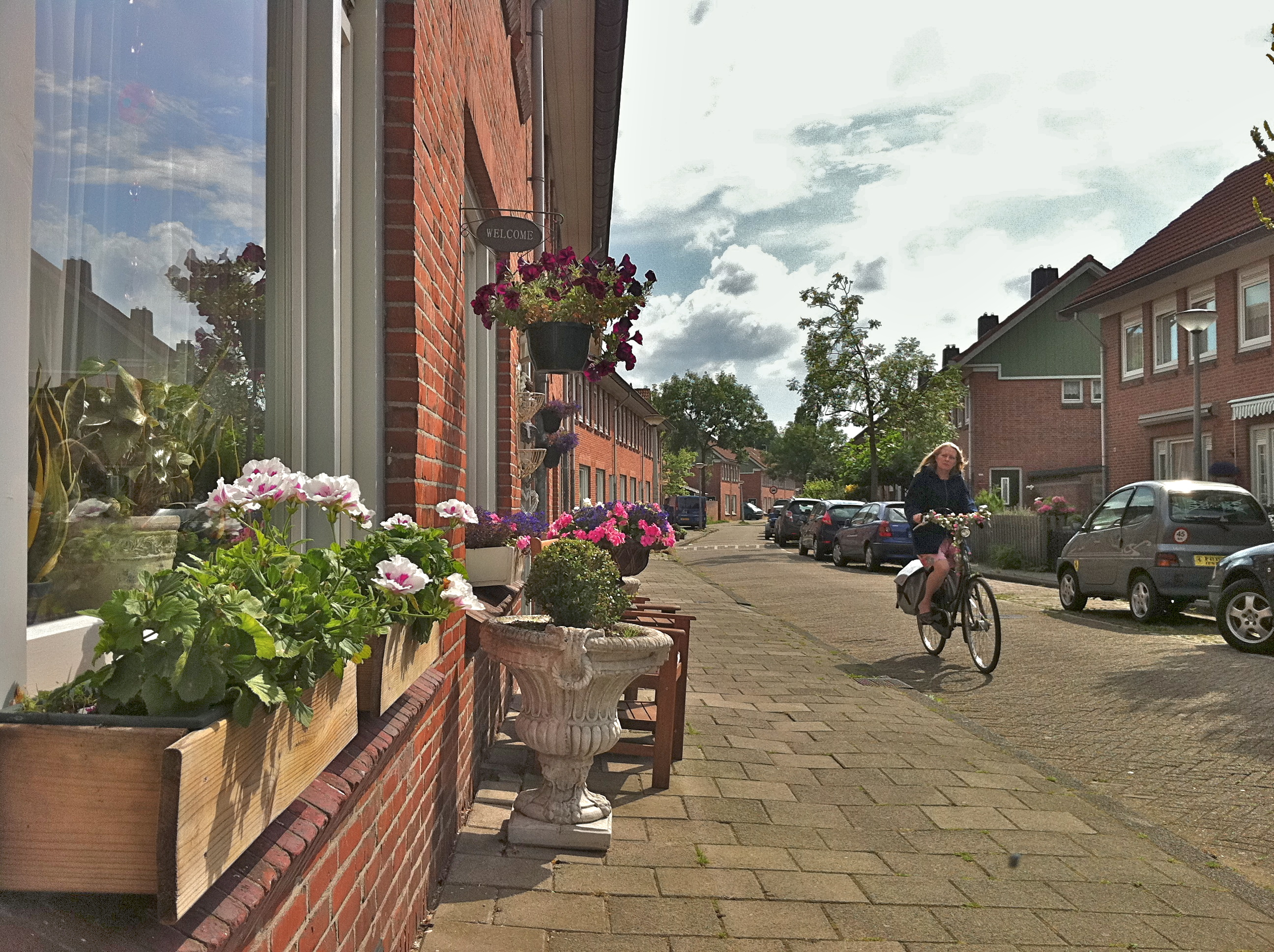 Tuindorp Buiksloot Amsterdam-Noord juli 2011